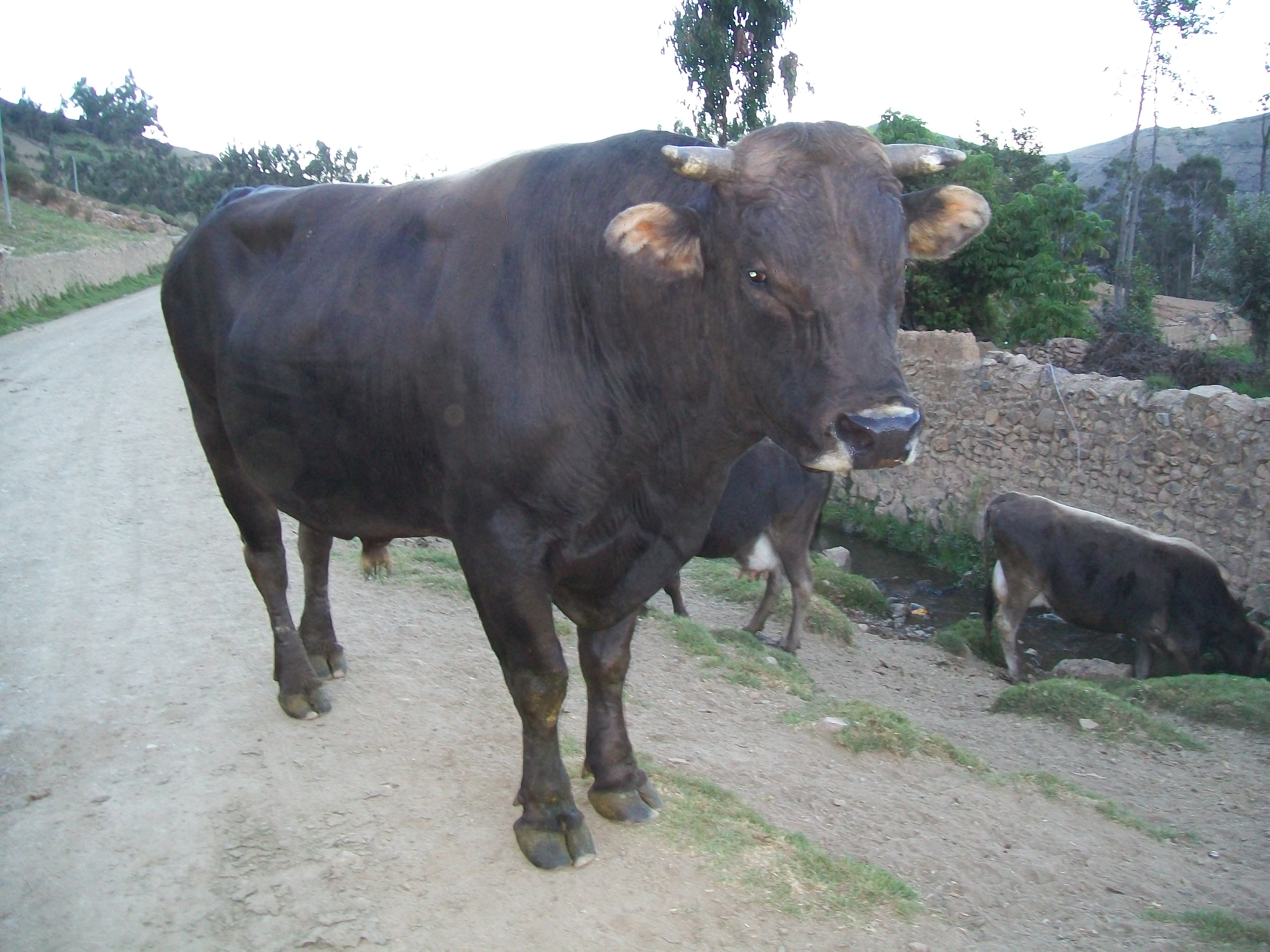 Ganadería Nombre: Padrillo País: Perú Fotógrafo:©Edgar Amador Espinoza Montesinos